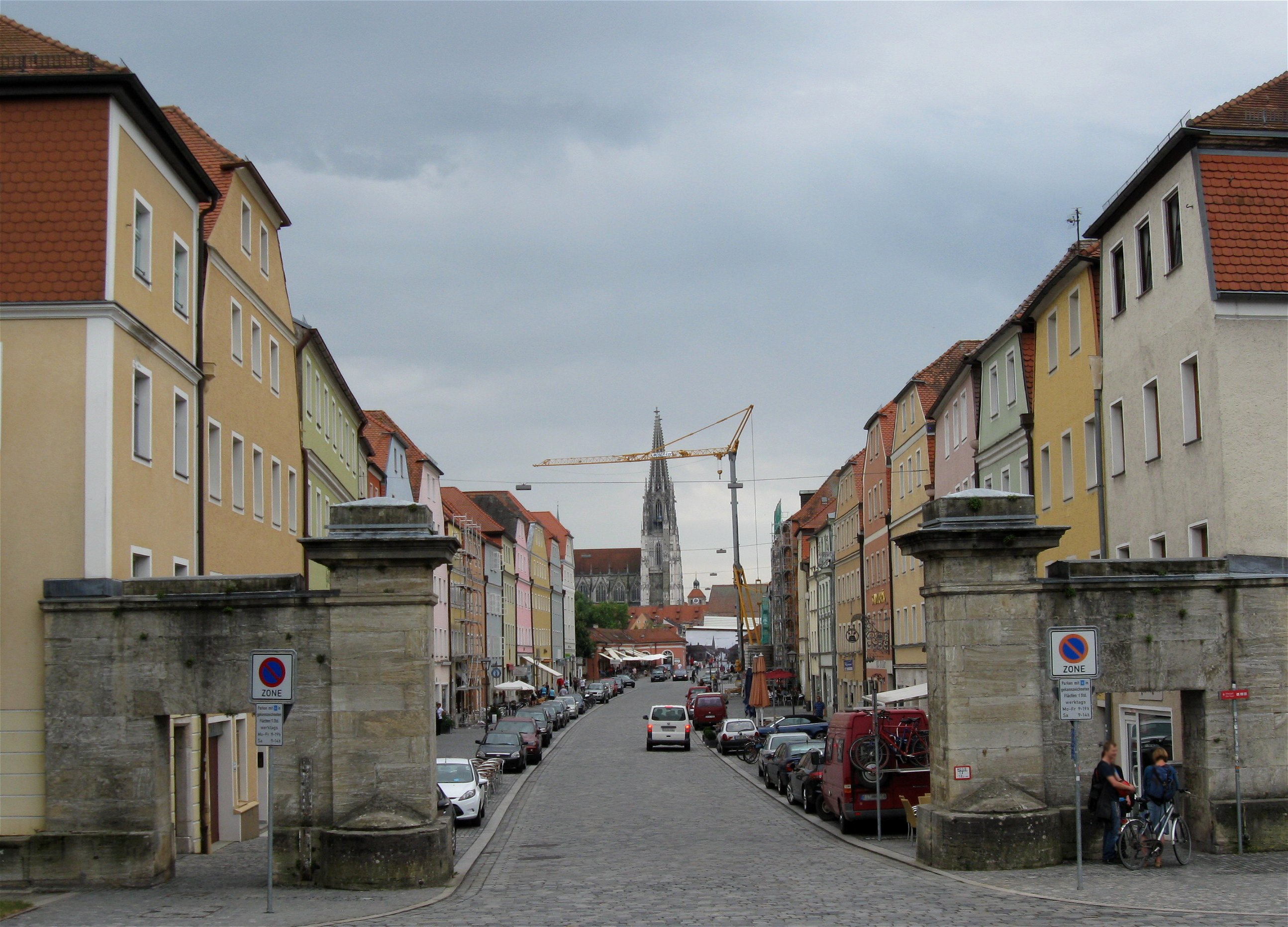 Stadtamhof; Stadttor; dreiteilige Anlage mit pylonenähnlichen Pfeilern, Durchfahrt und zwei gewölbten Durchgängen, seitlich Tormauern, Sichtquadermauerwerk, klassizistisch, 1825